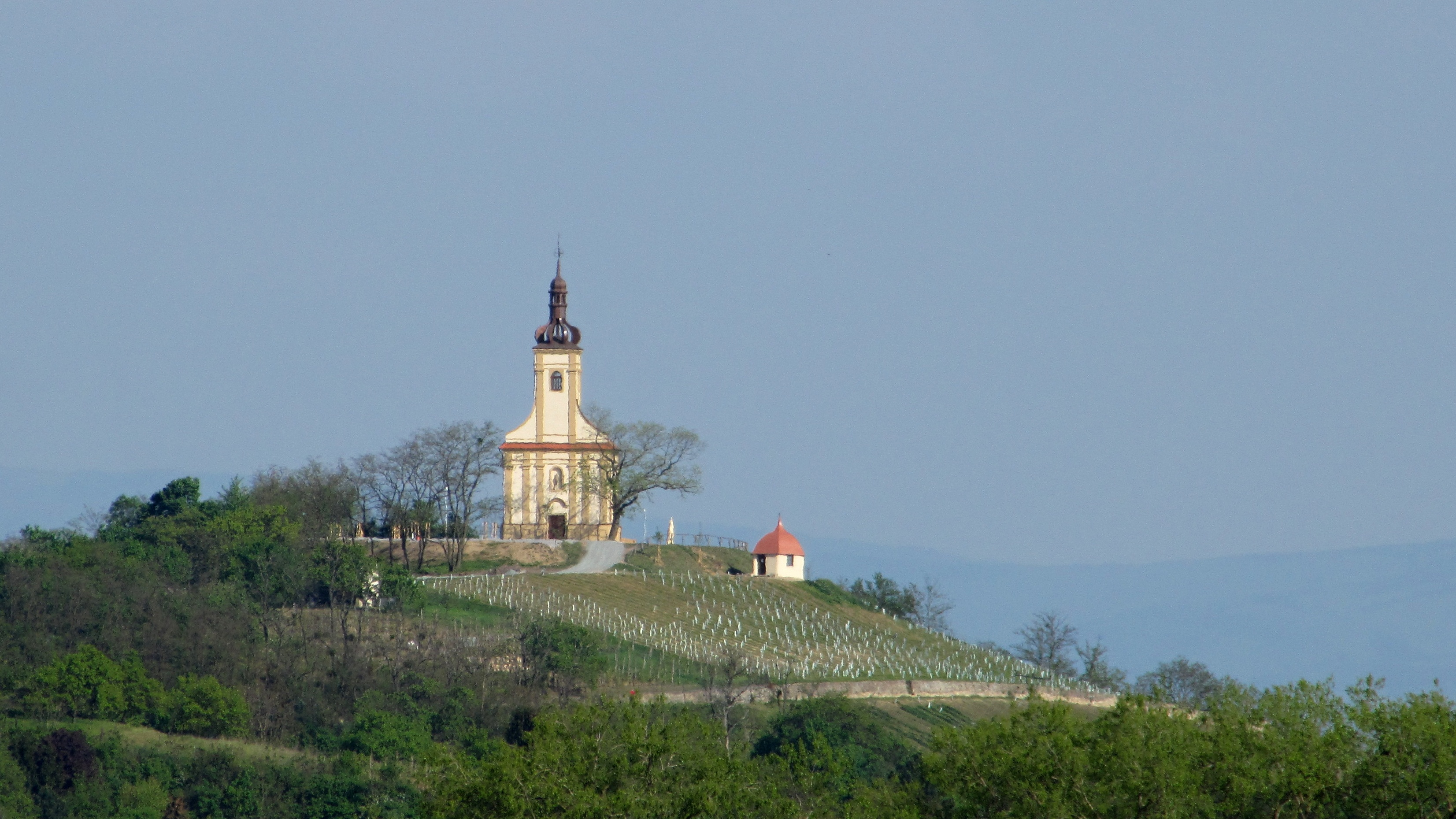 Kaple svatého Floriana ve Bzenci